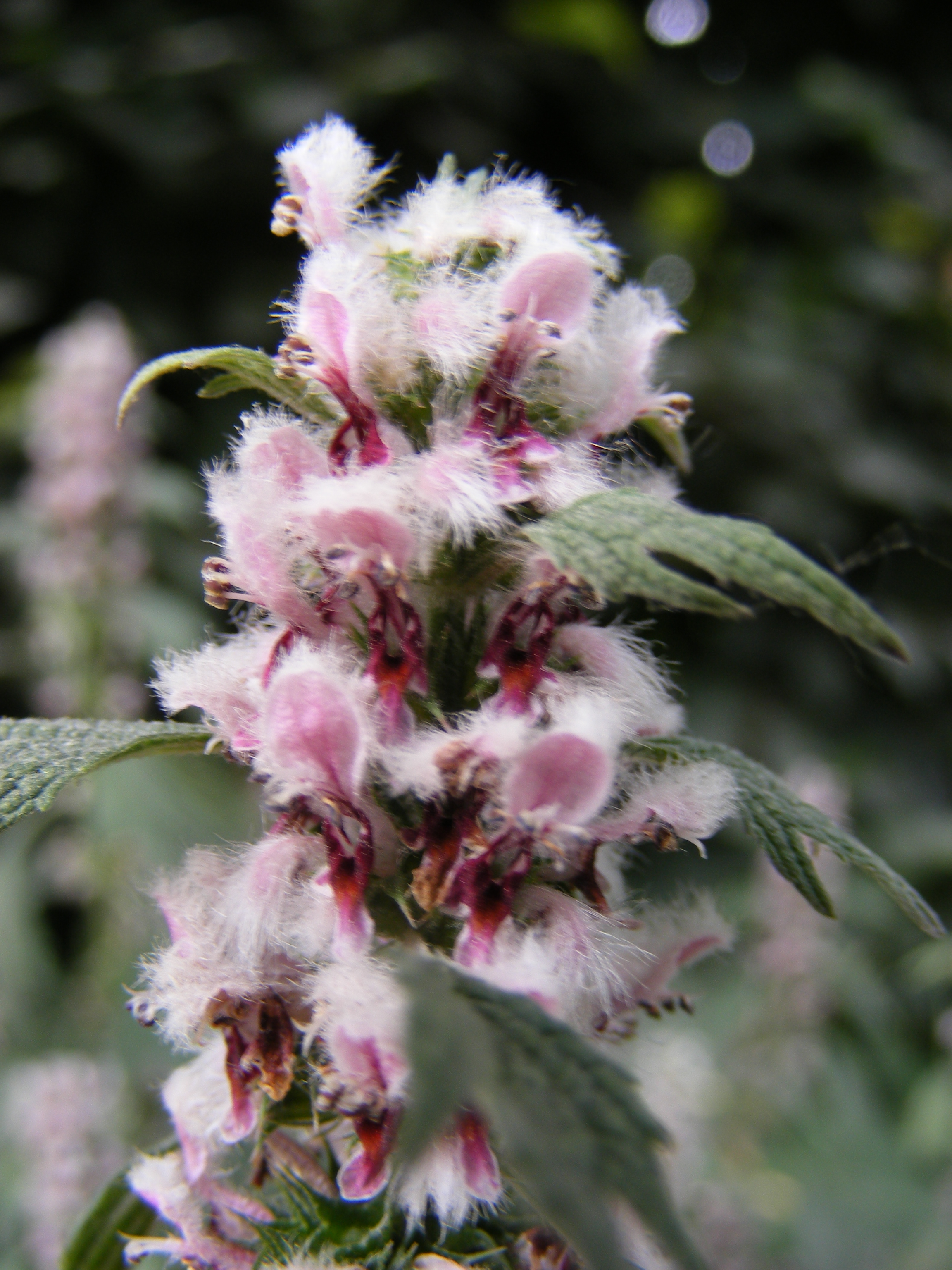 Hartgespan, gefotografeerd in Wagenigen, 3-7-2010 Leonurus cardiaca